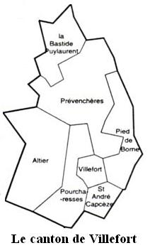 Le canton de Villefort Image personnelle